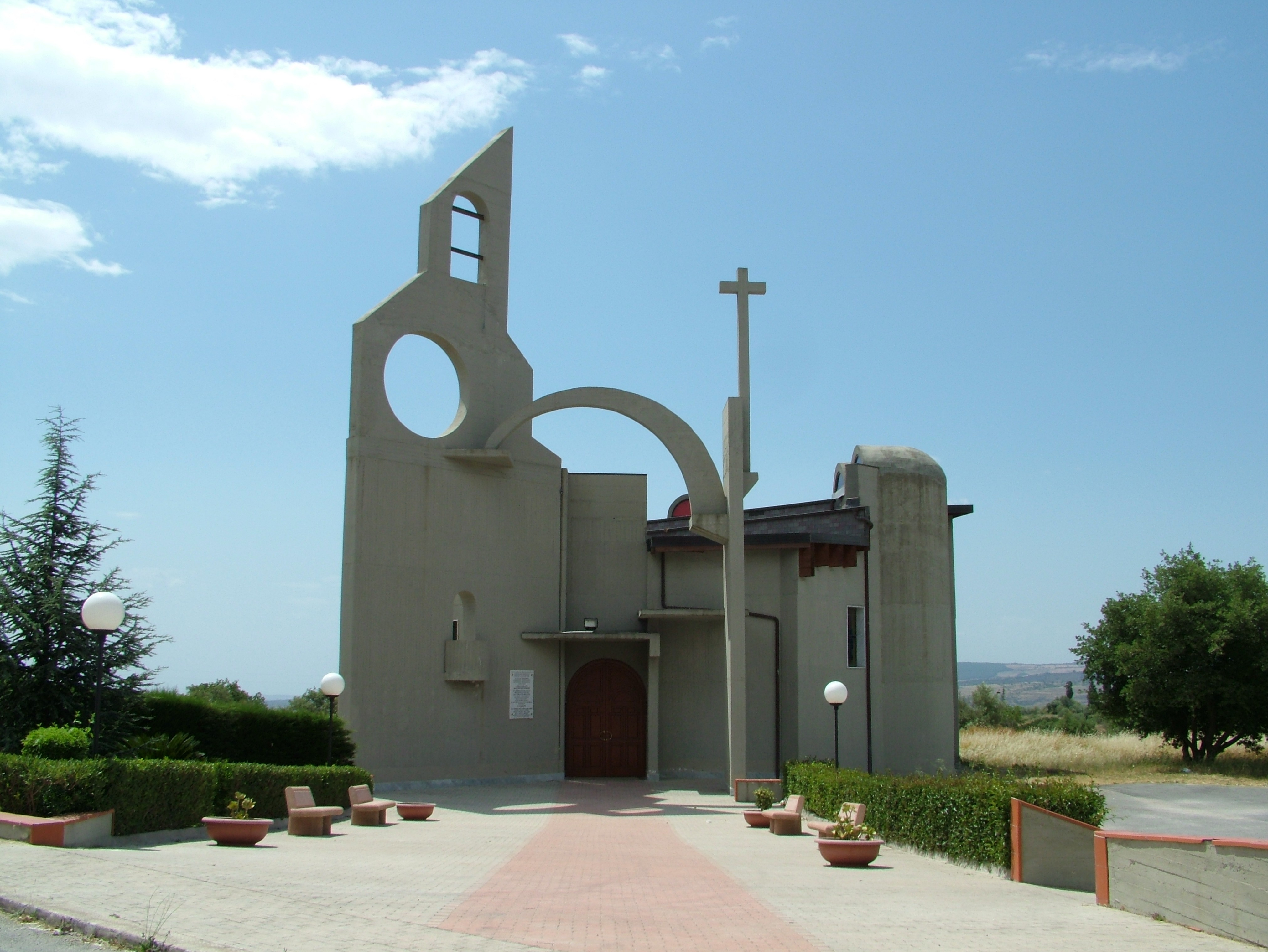 Sortino, Sizilien, die neue Kirche